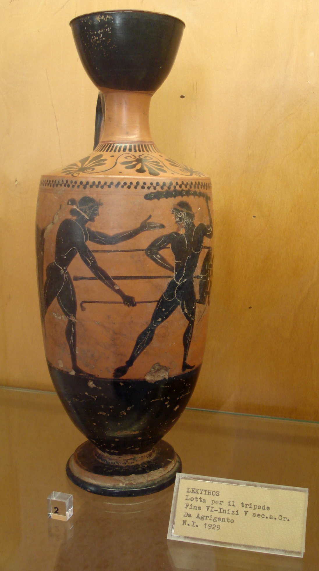 Lotta fra Eracle e Apollo per il tripode di Delfi. Lekythos del sec. VI-V a.C., da Agrigento (Sicilia). Museo archeologico regionale di Palermo, 28 settembre 2006. Foto di Giovanni Dall'Orto.